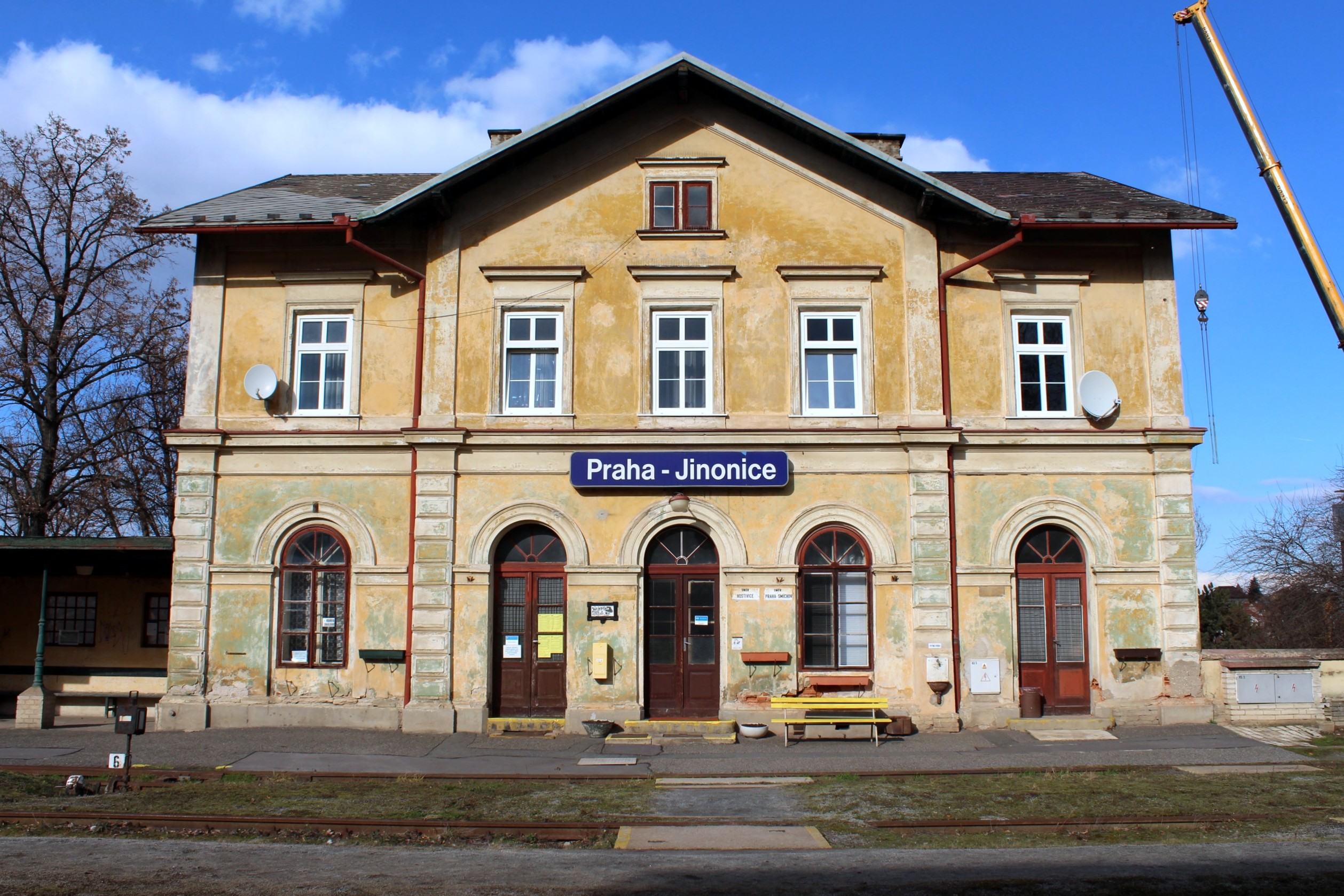 Nádraží Praha-Jinonice